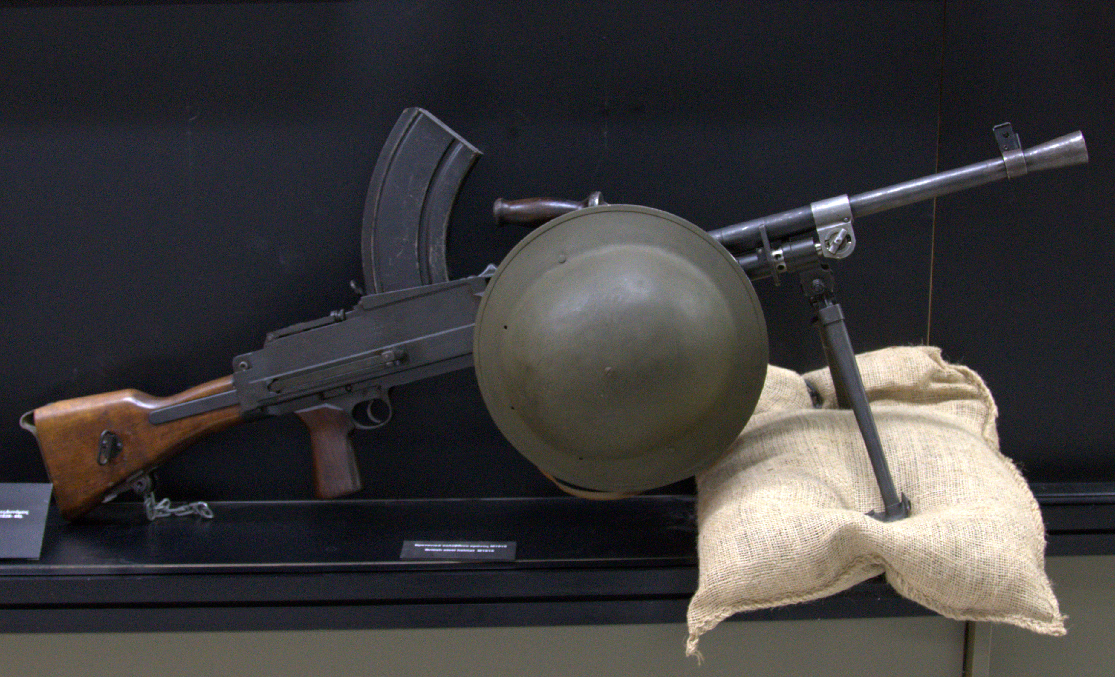 Πολεμικό Μουσείο Ελλάδος. Αθήνα